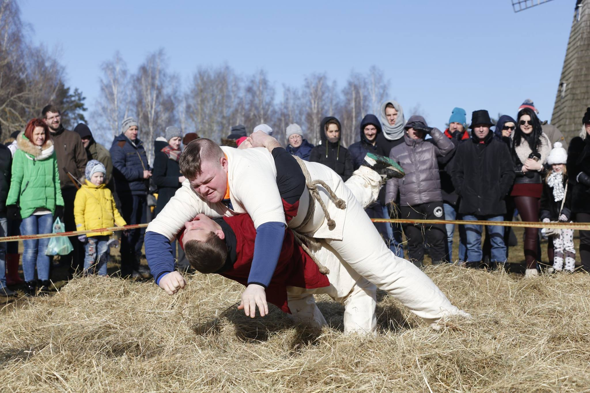 Metimas "iš pagulų" lietuviškųjų ristynių varžybų Rumšiškių liaudies buities muziejaus "Tėviškė" Užgavėnių šventės metu 2017 02 25